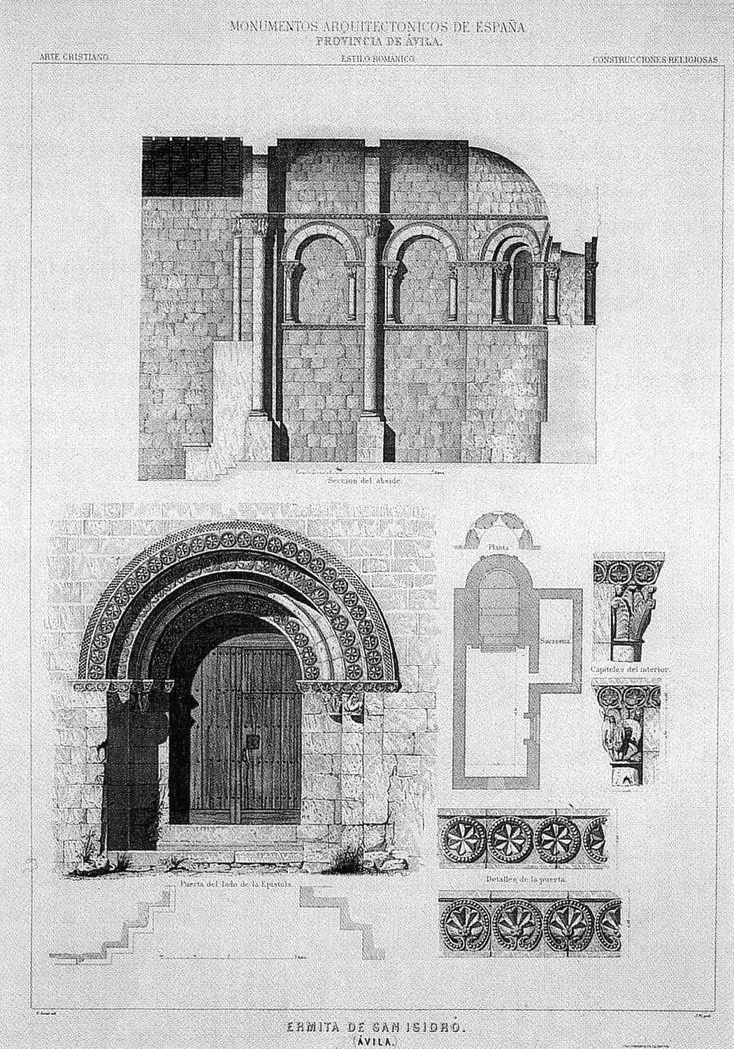 Ermita de San Isidro o San Pelayo o San Isidoro, edificada en la ciudad de Ávila (España), cuyas ruinas se encuentran en el Parque del Retiro de Madrid. Dibujo de Francisco Aznar dentro de la obra Monumentos Arquitectónicos de España, 1856-1882. Grabado al aguafuerte sobre acero de Joaquín Pi y Margall